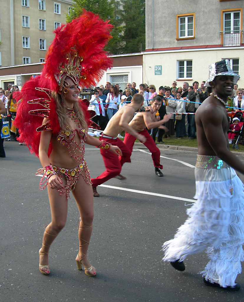 Samba dancer.